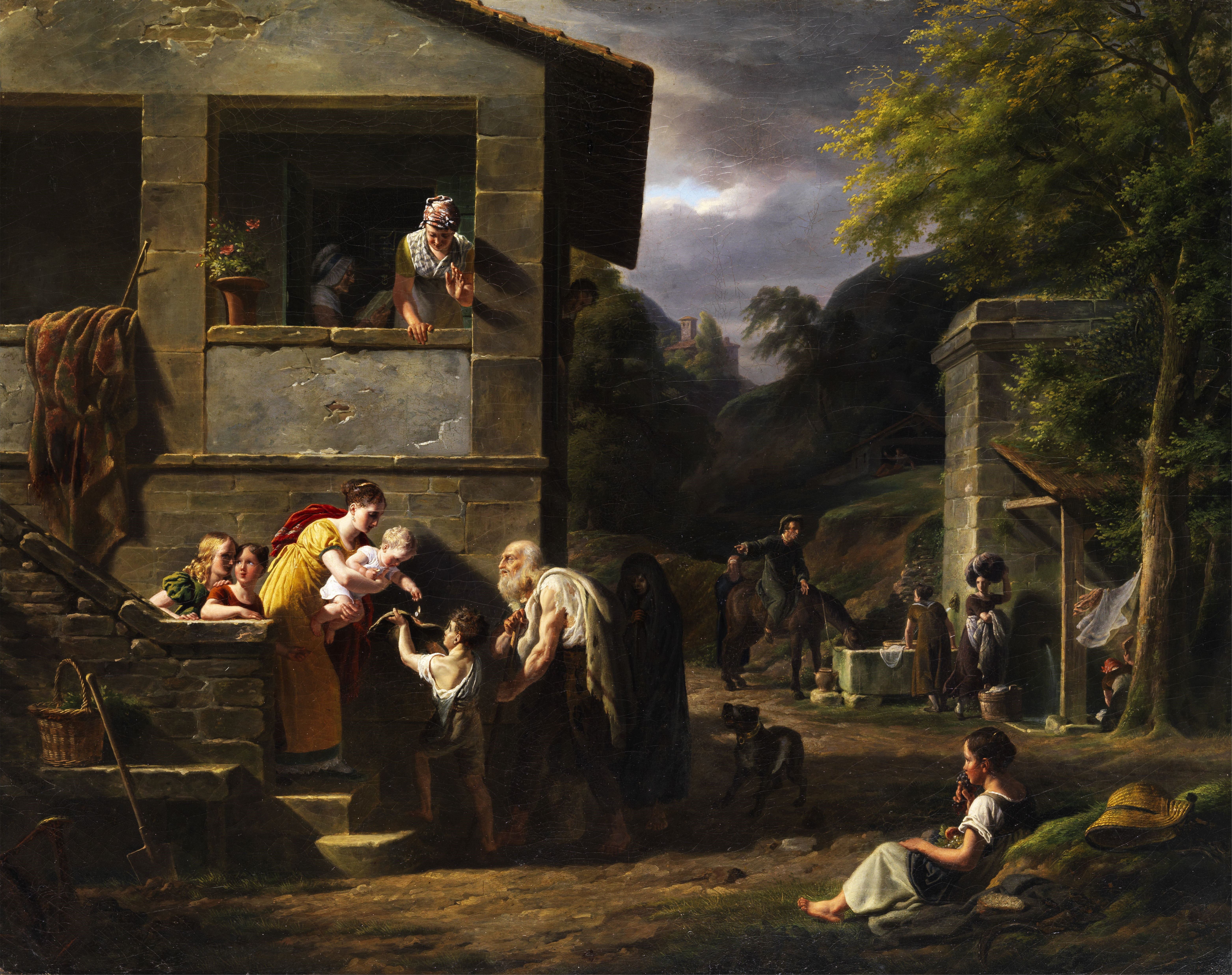 Blinder Bettler und kleiner Junge am Haus einer vornehmen Dame, Öl auf Leinwand, 73,5 x 91,5 cm. Links unten signiert und datiert "Béranger 1819".